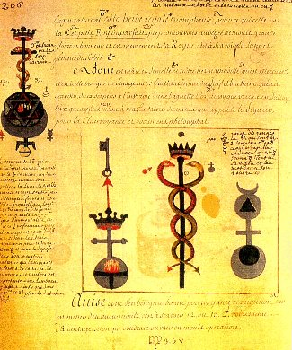 extrait de l'Alchimie de Flamel, par le Chevalier Denys Molinier "pensionnaire du Roy, amateur de la Science hermétique"